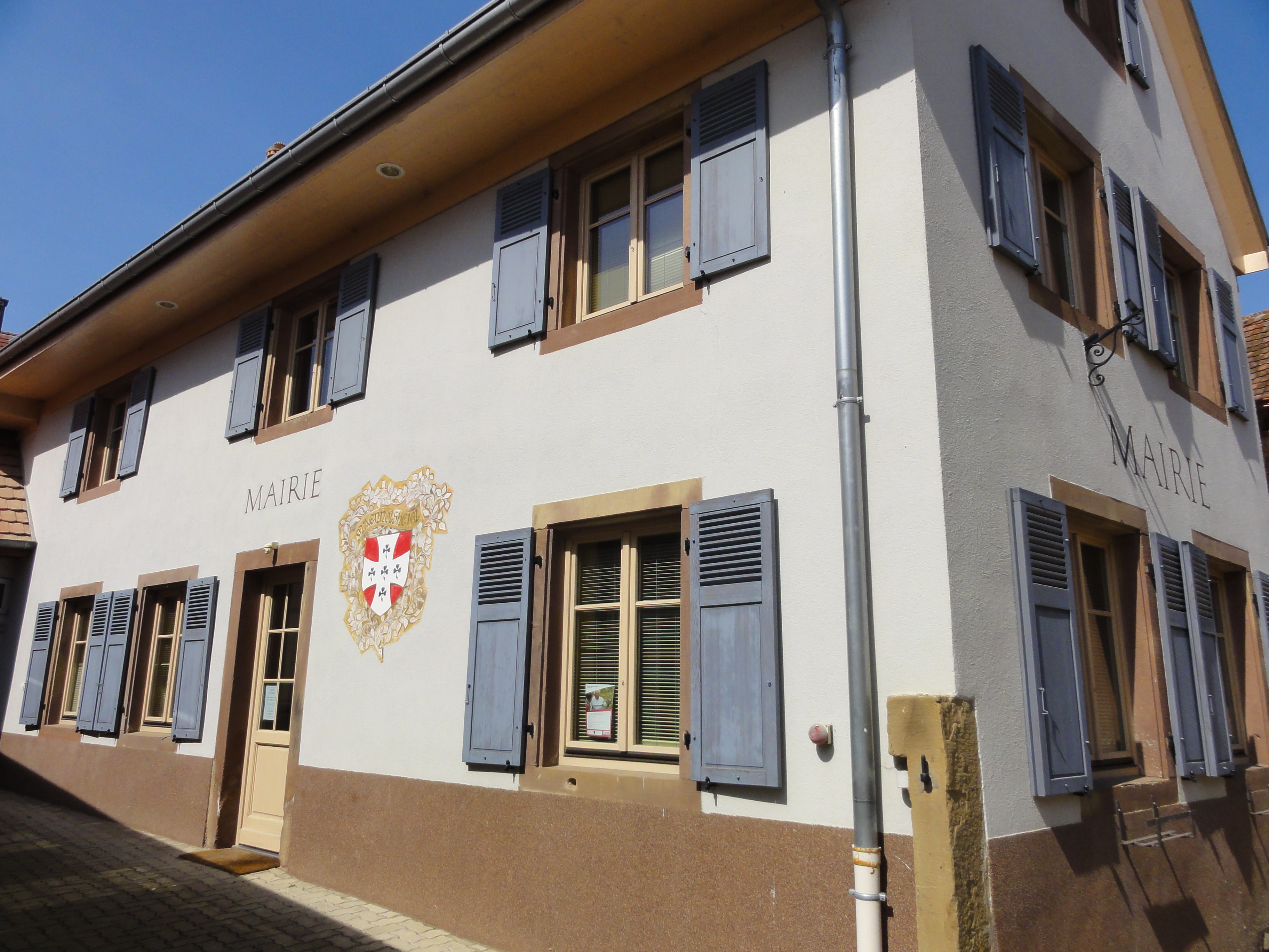 Alsace, Bas-Rhin, Maennolsheim, Mairie